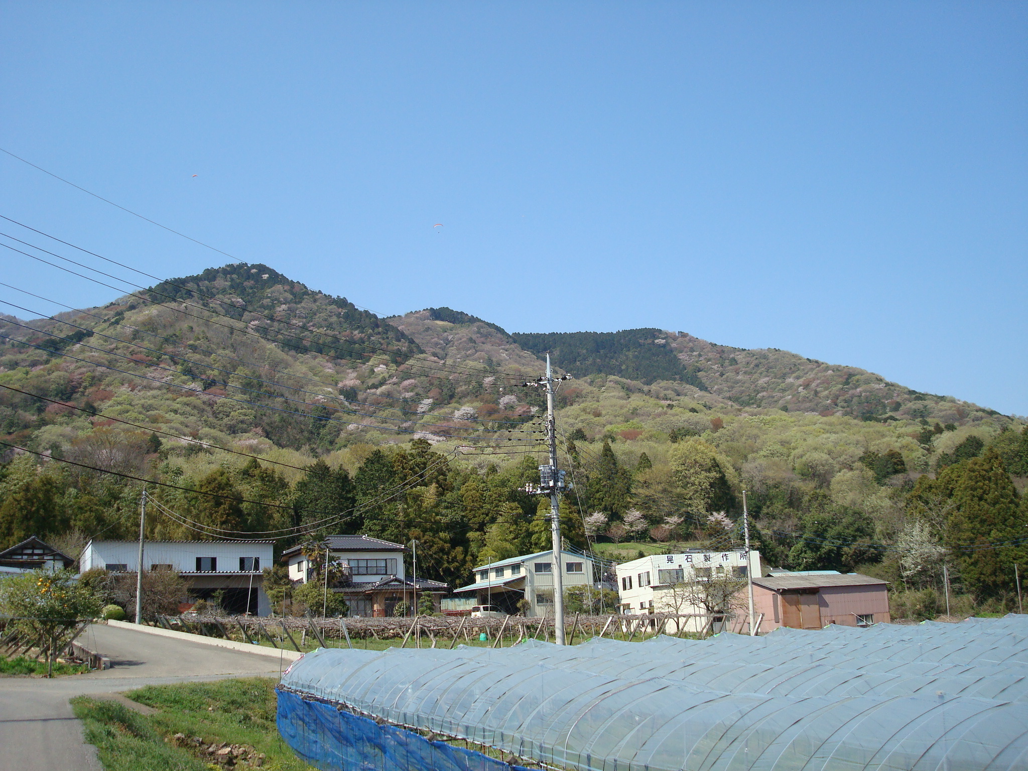 麓の果樹園から見た晃石山